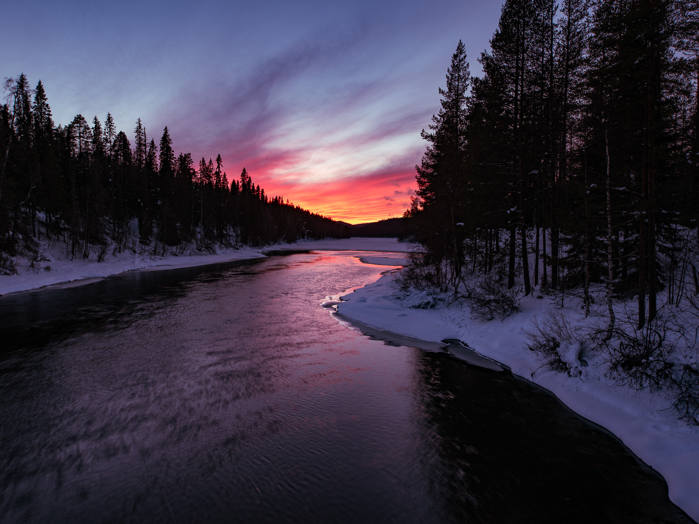 Национальный парк «Паанаярви»: Западная граница национального парка совпадает с государственной границей России с Финляндией. Со стороны финской границы к “Паанаярви” примыкает национальный парк “Оуланка”, Лоухский район, Карелия This image is related to the protected area of Russia number 1000069